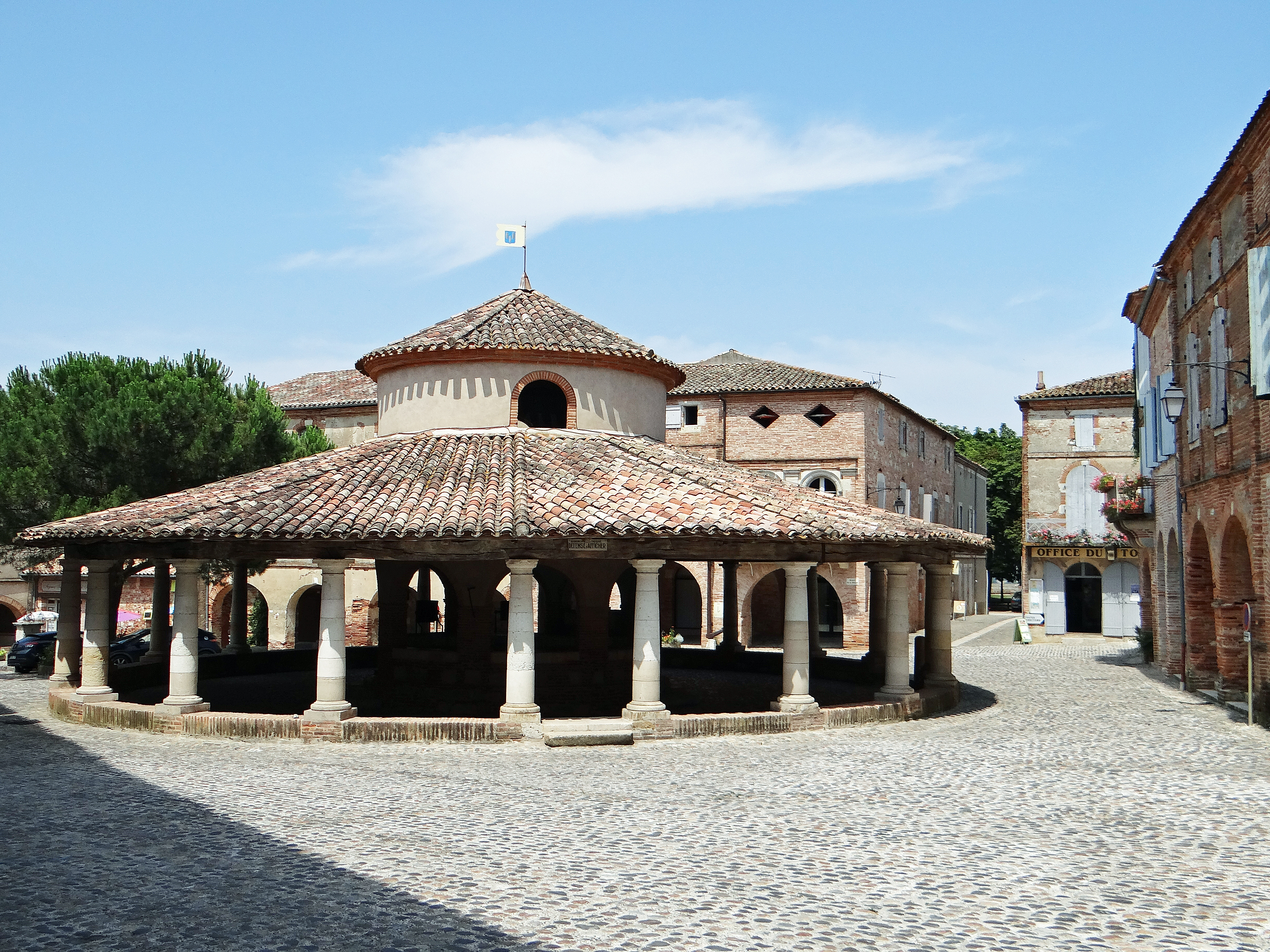 Auvillar - Halle aux grains et la place. De part et d'autre de la rue du château : l'Office du tourisme, au n°13, et la mairie au n°12 place de la Halle